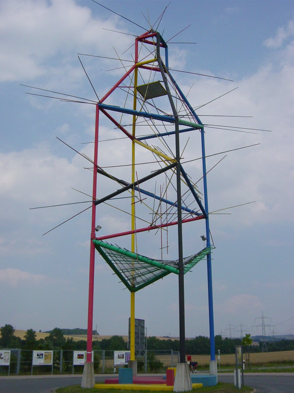 Feiningerturm in Mellingen als „doppeltes Motiv“ des Kirchturms; 1999 nach einer Idee von Marcel Kalberer errichtet; basierend auf s Gemälde Dorfkirche von Mellingen von 1920